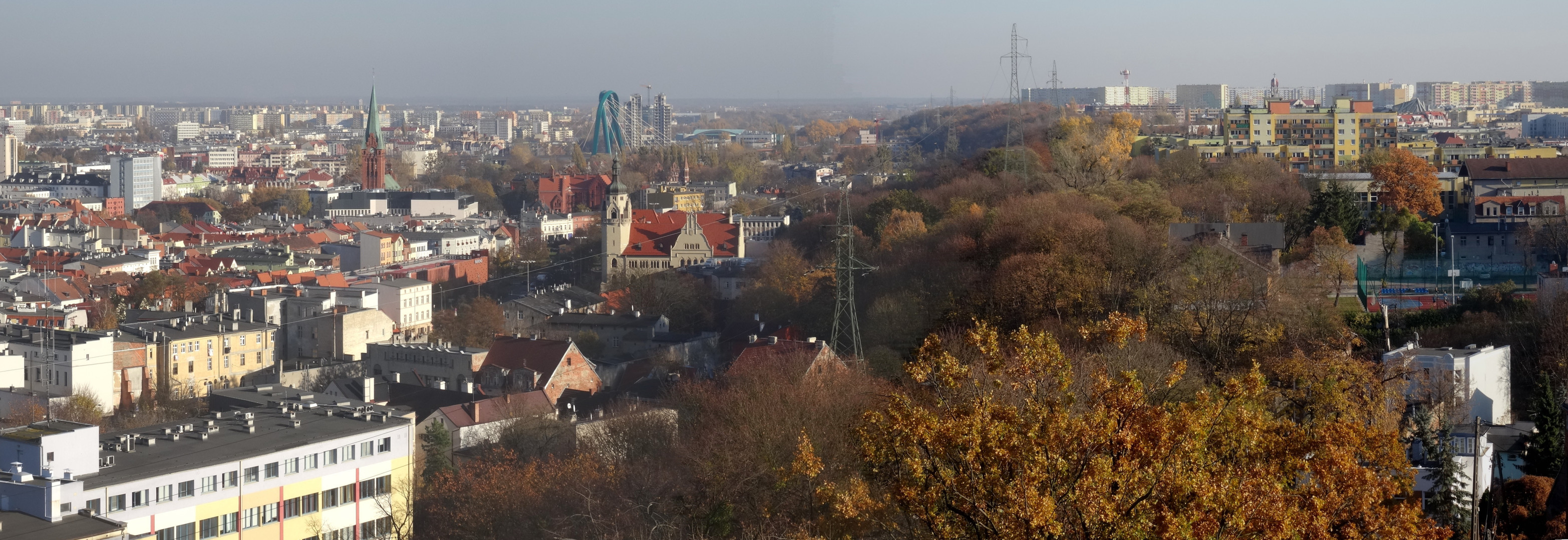 Zbocze Bydgoskie widoczne z galerii widokowej na szczycie wieży ciśnień w Bydgoszczy